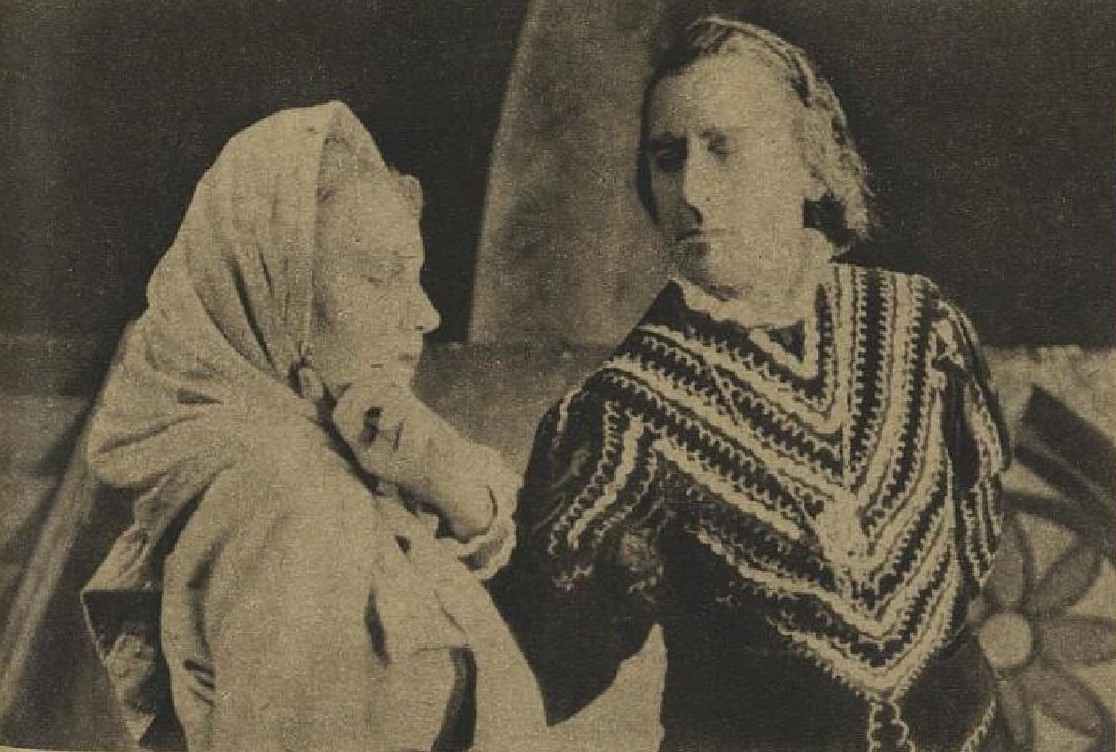 Antonín Brož (1895-1983), český herec, režisér a divadelní ředitel